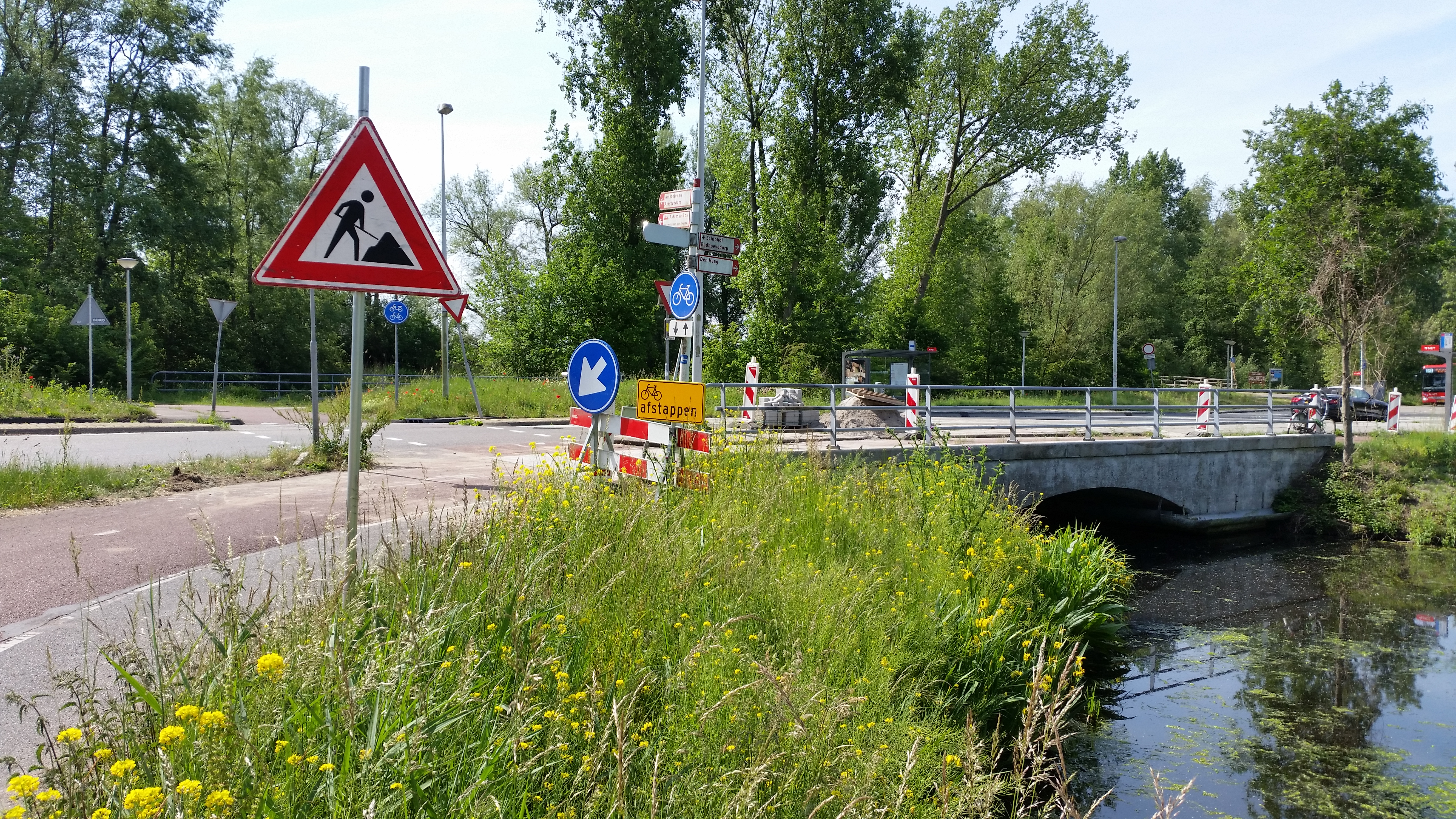 Impressie van brug 1863 in de Oude Haagseweg, Amsterdam Nieuw-West